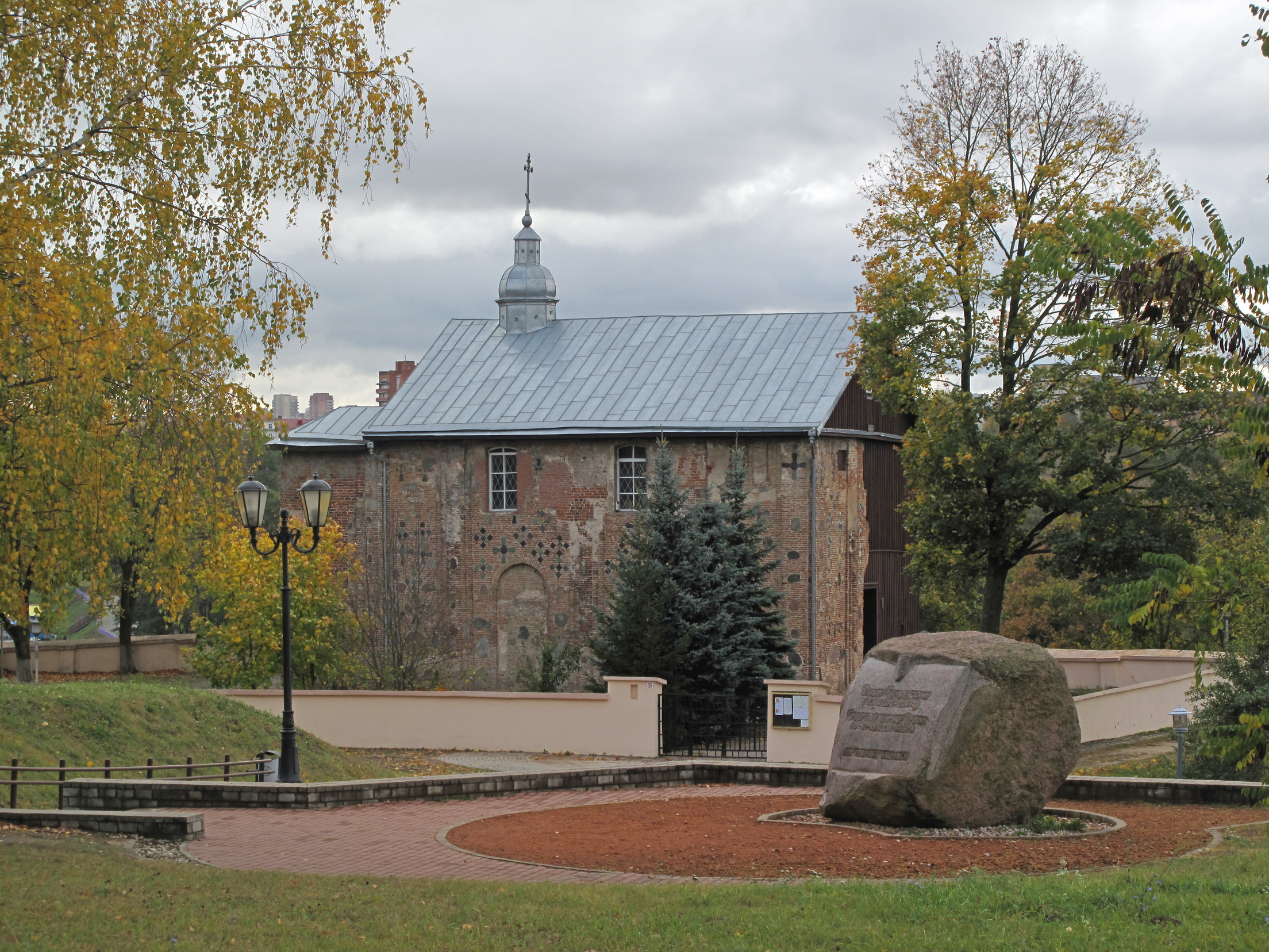 Беларуская (тарашкевіца): Вечер